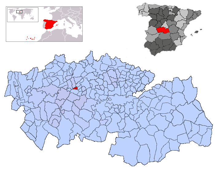 Illán de Vacas en la provincia de Toledo